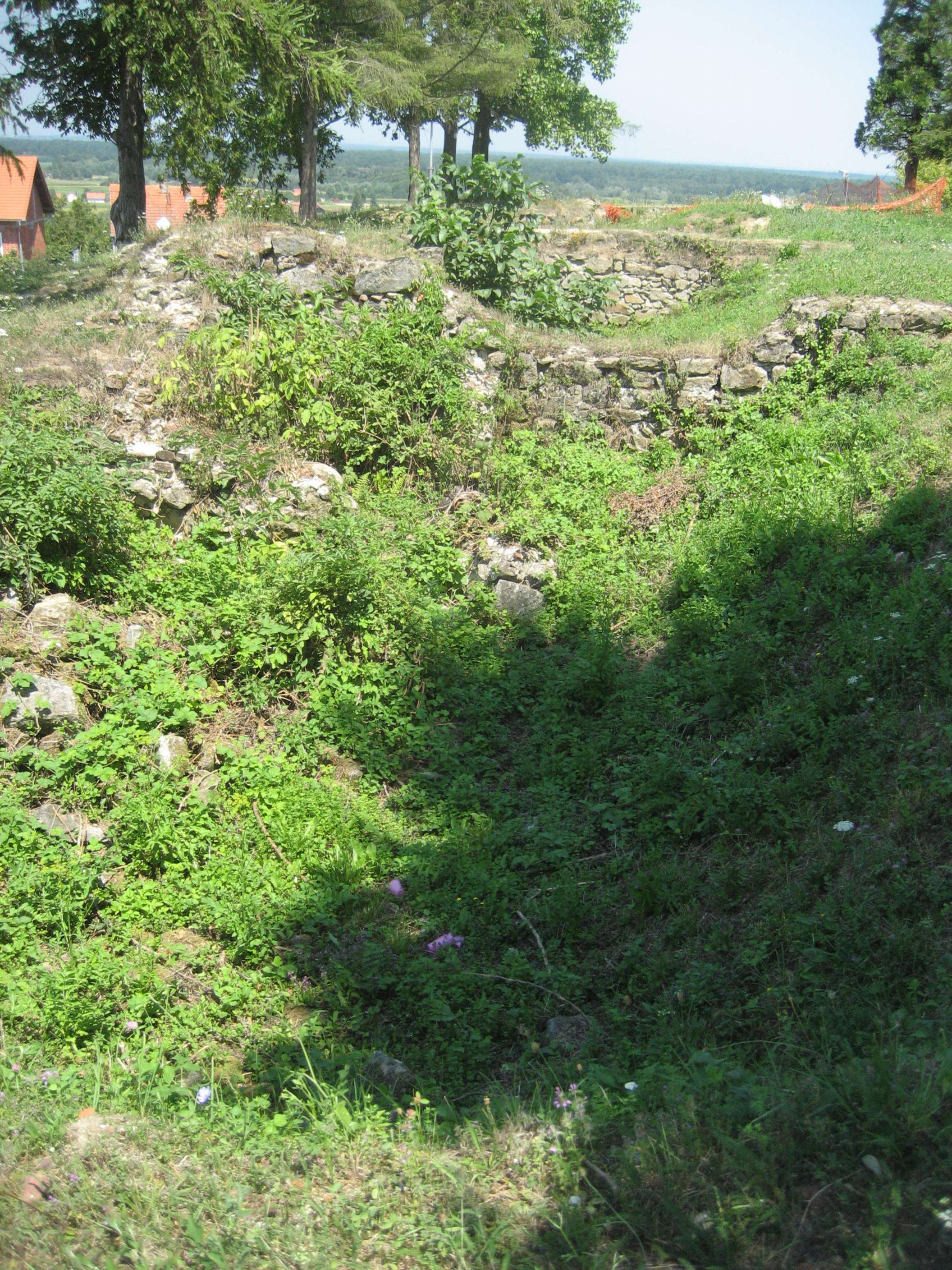 Grundmauern der Burgruine in Cazma, Kroatien